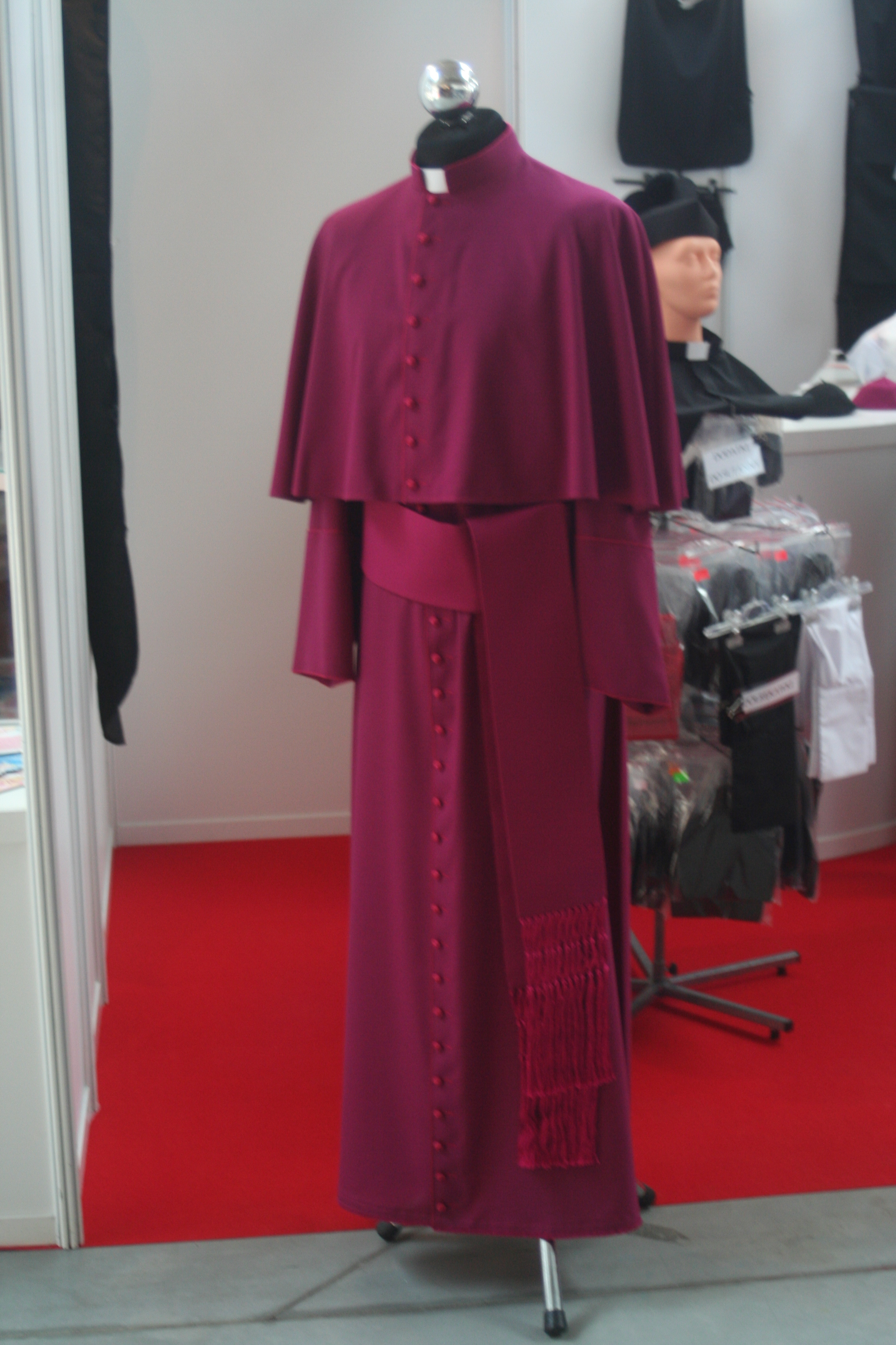 Sutanna biskupa na stoisku jednej z firm na targach SACROEXPO 2013 w Kielcach